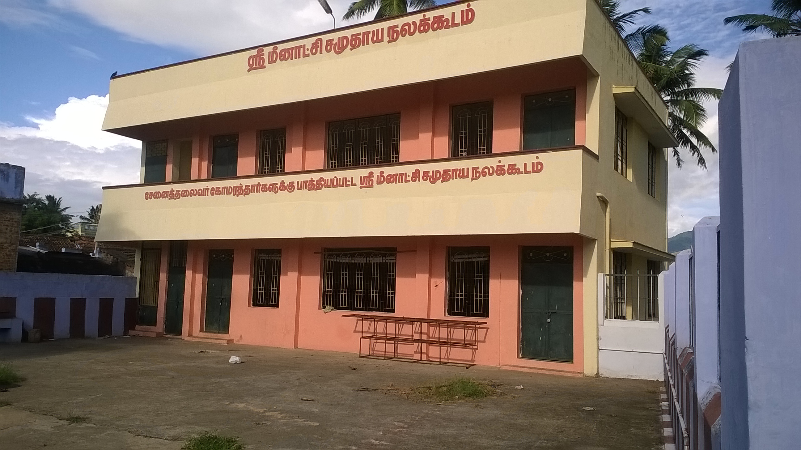 கட்டுரைக்கு